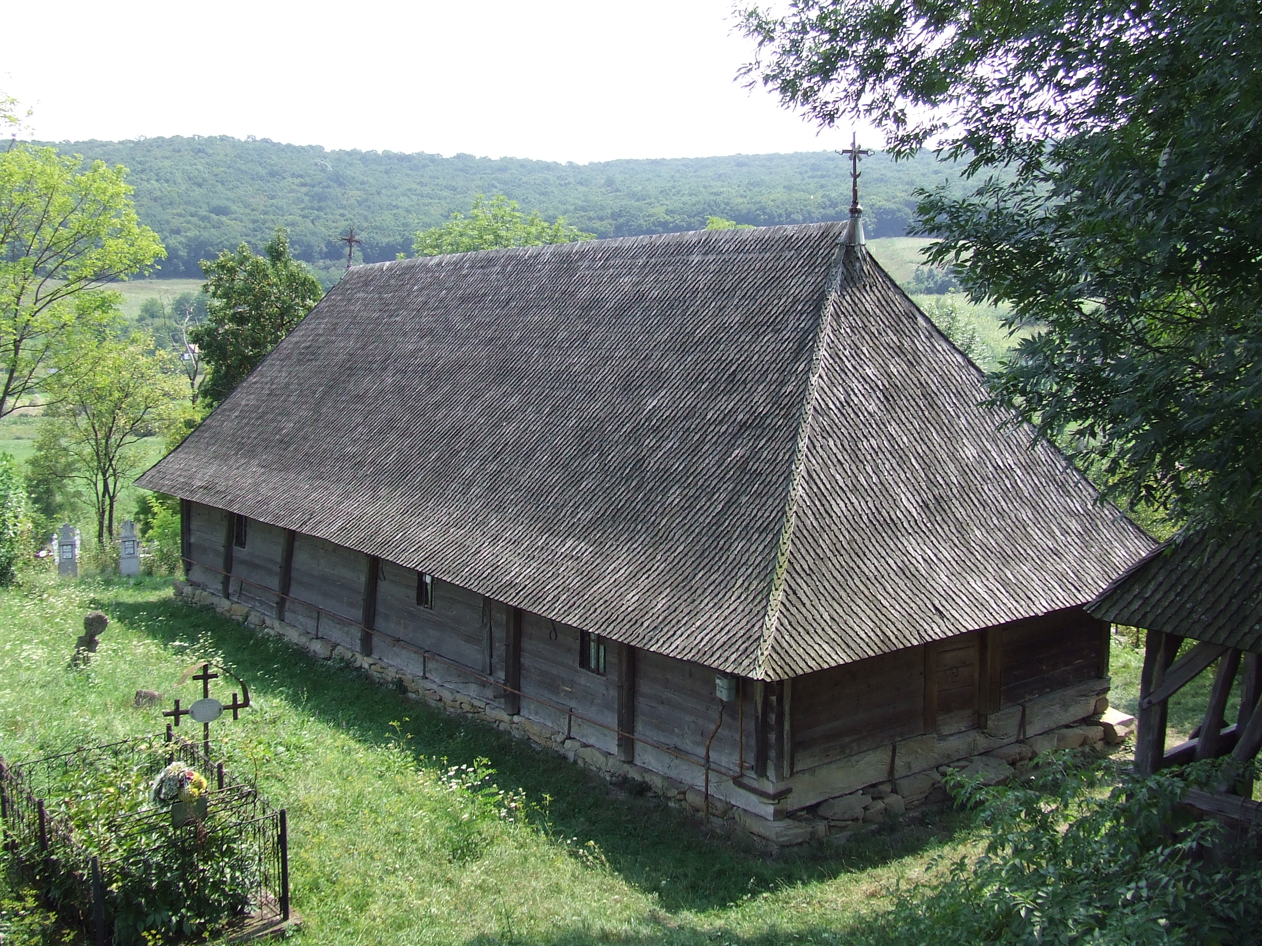 Biserica de lemn cu hramul Buna Vestire din Deag, judeţul Mureş.